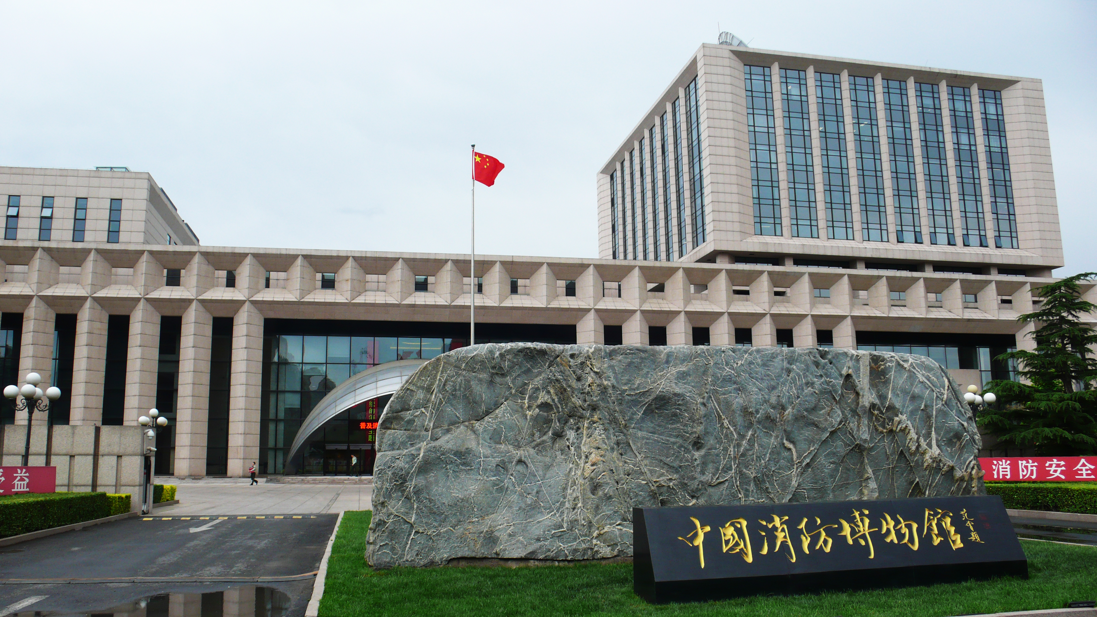 中国消防博物馆。